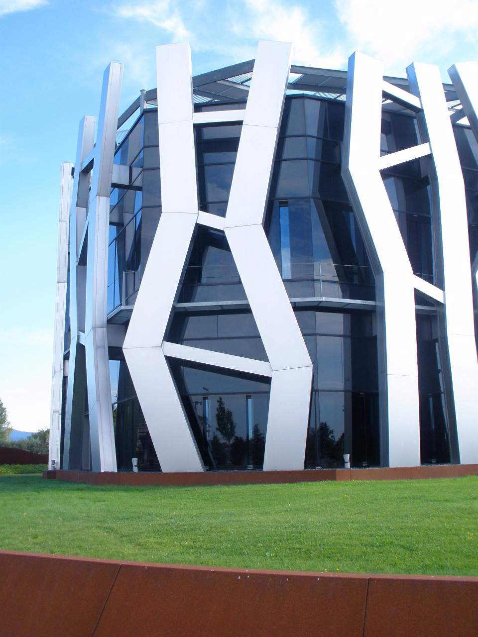 Vitoria — Caja Vital Kutxa, sede de Salburua facade.